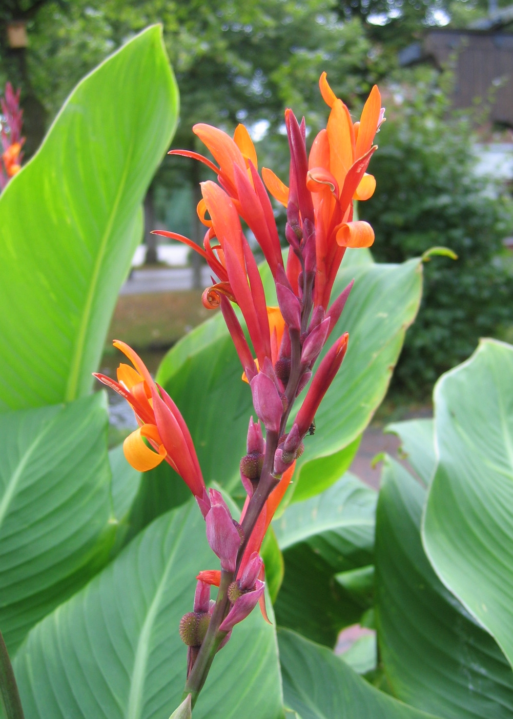 Blütenstängel einer Canna indica (Indisches Blumenrohr).